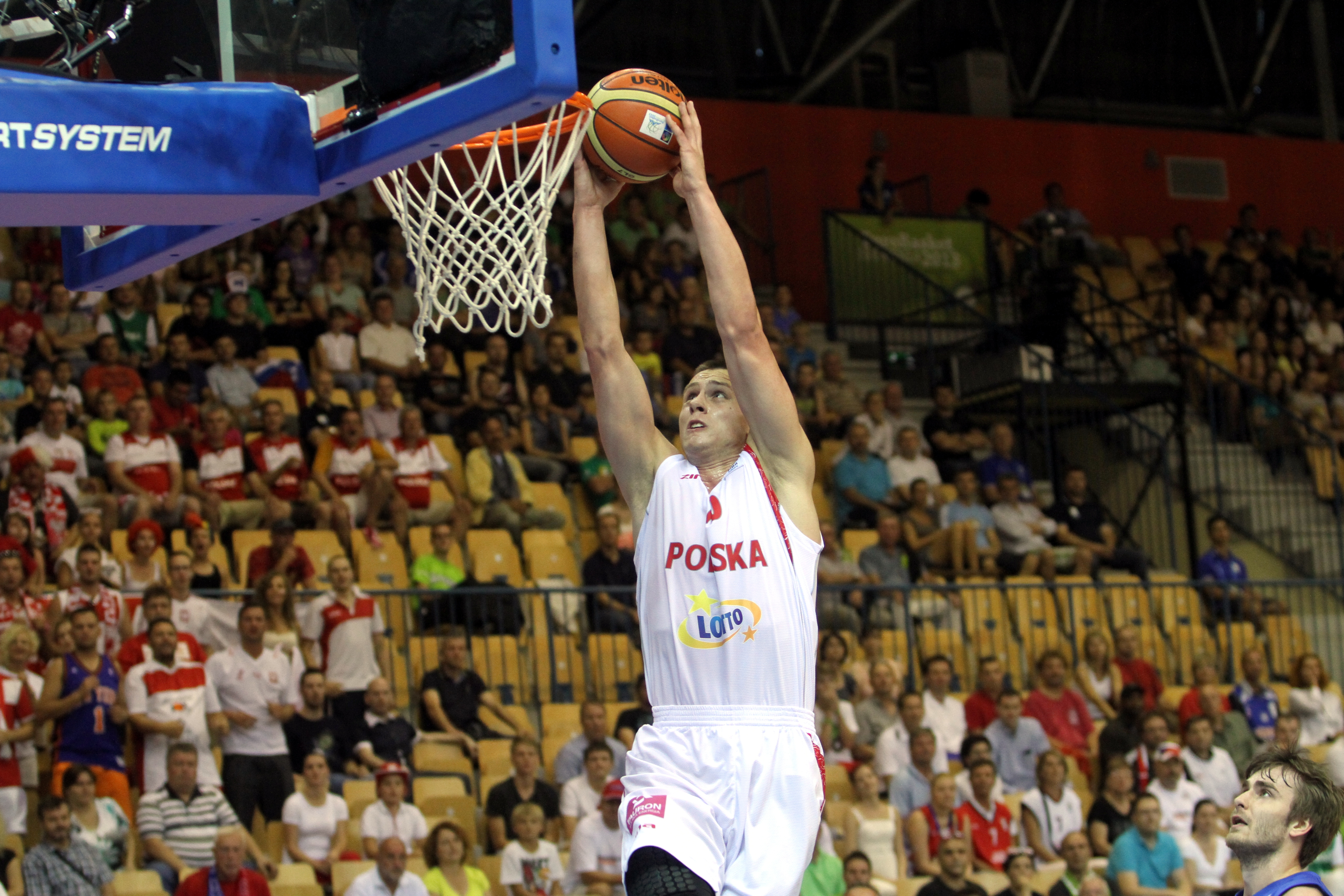 Reprezentacja Polski koszykarzy z 2013 roku. Mateusz Ponitka